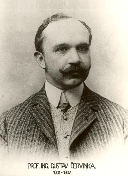 Gustav Červinka (1868-1907), český železniční inženýr, drážní inspektor a vysokoškolský pedagog